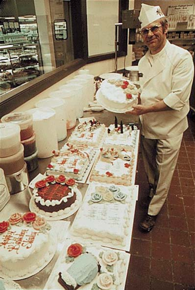 Konditor